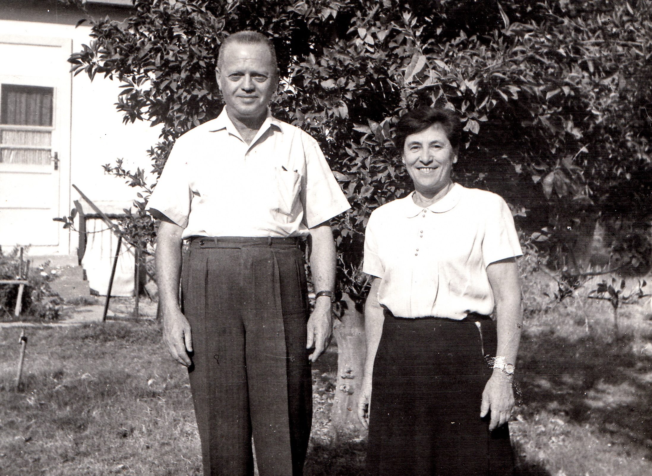 יונה וזאב און. 7.11.1959 תל יוסף